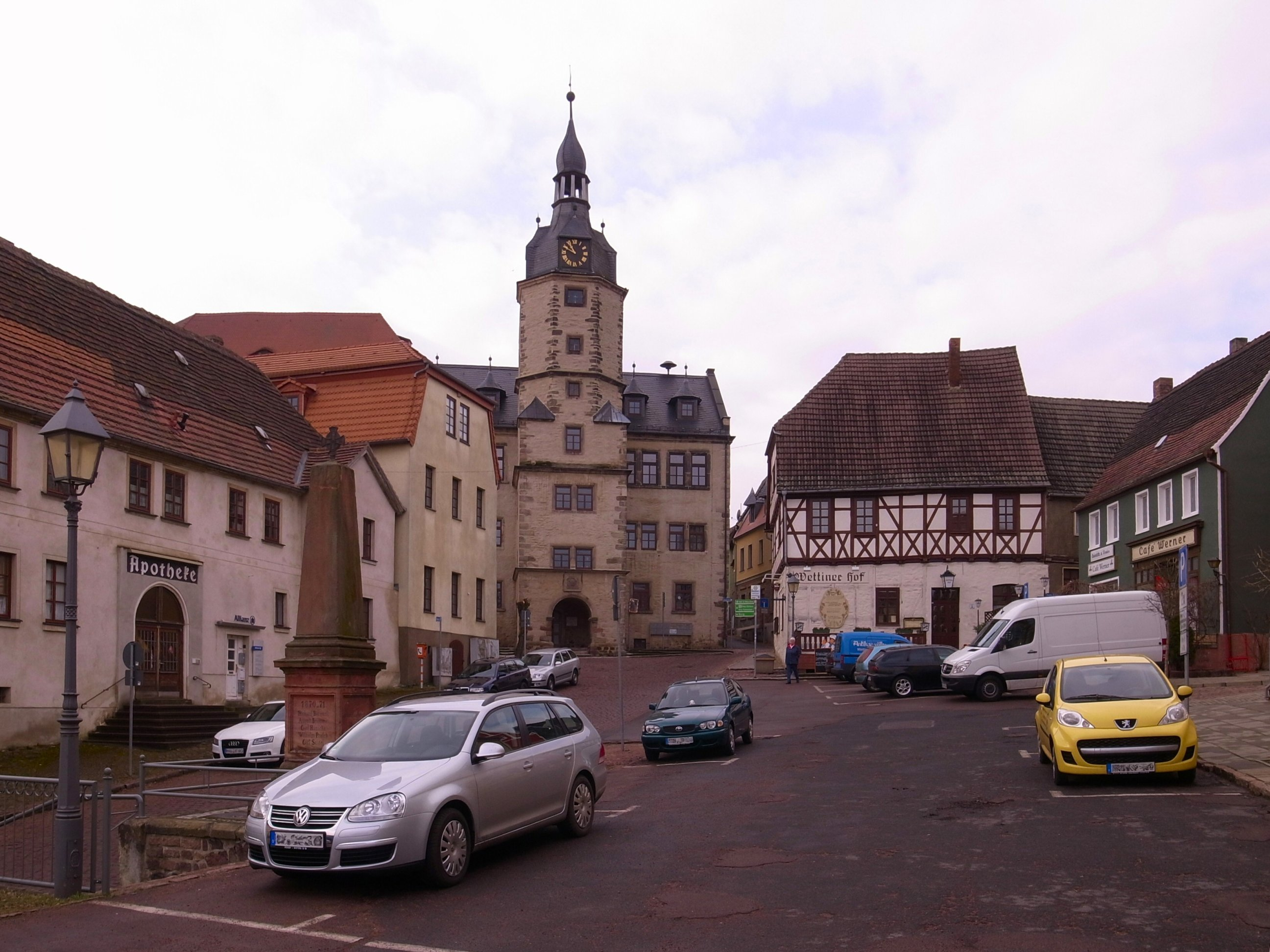 Wettiner Rathaus am Marktplatz